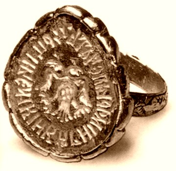 Перстень-печать царицы Марии Темрюковны. Россия. 1560-1569. До революции он хранился в собрании Оружейной палаты, а ныне находится в коллекции Государственного исторического музея. Перстень использовался в качестве печати - известна его прорисовка, сделанная для книги А.Б. Лакиера «Русская геральдика». Следует заметить, что эта прорисовка, часто воспроизводящаяся в различных изданиях, неточна. Щиток перстня имеет неправильную, яйцевидную форму. На внешней стороне ободка сохранились остатки орнамента. В центре на щитке перстня помещено изображение двуглавого орла. Этот орел в целом подобен орлам конца XV - первой половины XVI в., в том числе и орлу с блюда. Крылья орла раскрыты, но опущены, клювы приоткрыты, но языков (в отличие от прорисовки Лакиера) не видно. Четко обозначен хвост орла, состоящий из пяти перьев. Лапы орла довольно крупные, пальцы растопырены, на каждой лапе по четыре пальца, короны на головах орла лишь обозначены небольшими треугольниками. Сам размер вещи, конечно же, не позволял резчику передать все детали, но некоторые элементы получились весьма выразительными. Вокруг центрального изображения идет легенда: наверху точка, затем: «црцi и великiи кнгнi Марьi печать» (некоторые буквы соединены лигатурами, буква «в» написана, как в позднем полууставе). Вообще надпись производит впечатление более архаичной по стилю графики, нежели надпись на блюде, что объясняется, по-видимому, особенностями того материала, с которым приходилось иметь дело мастерам. Изображение орла, как видим, также отличается от его официального сфрагистического варианта, но соответствует упрощенному варианту предметов декоративно-прикладного характера. По всей видимости, такой вариант (учитывая сфрагистическую функцию перстня), отличающийся от изображения герба на царской печати, был наиболее подходящим для печати царицы.